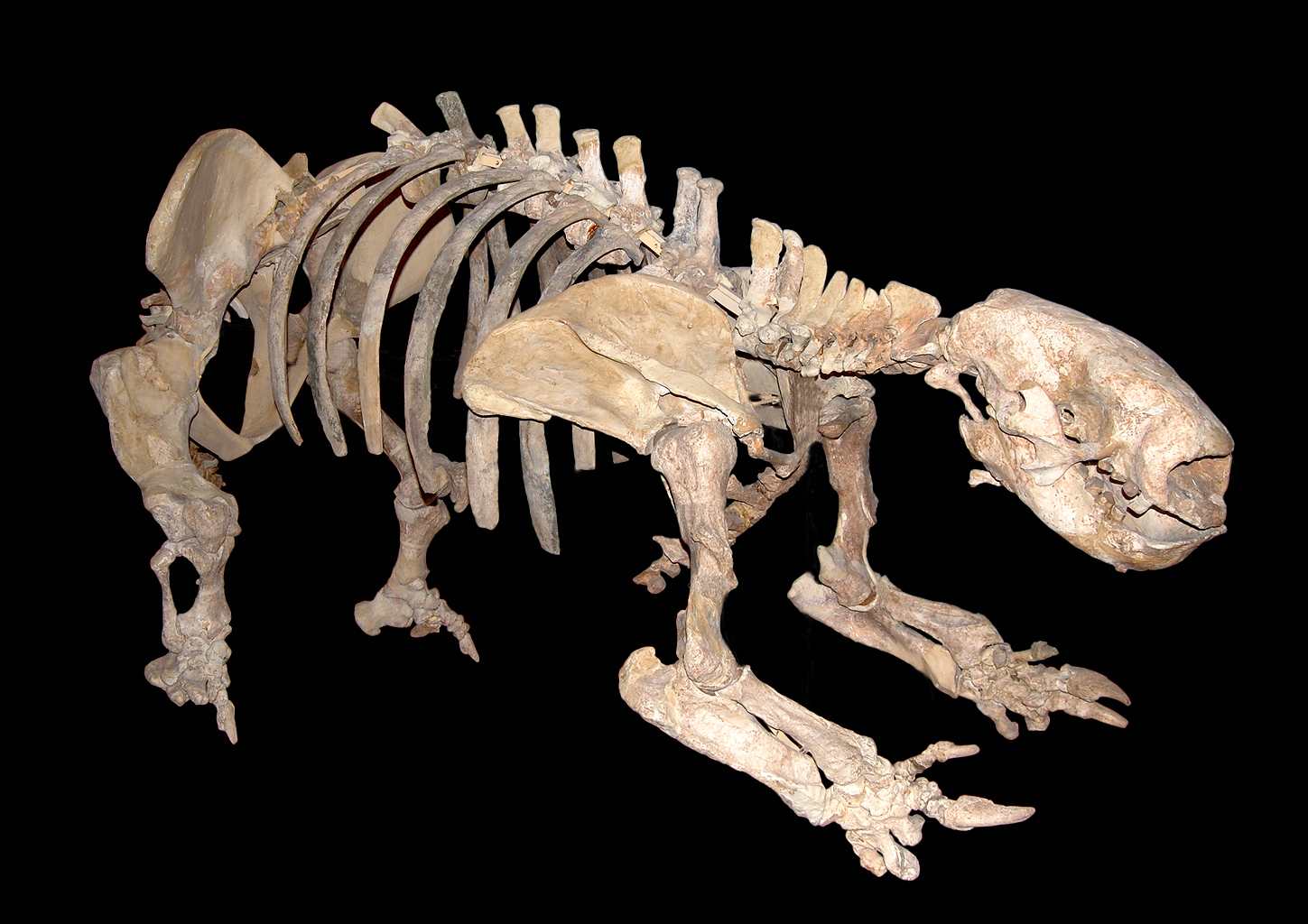 Naturhistorisches Museum Wien